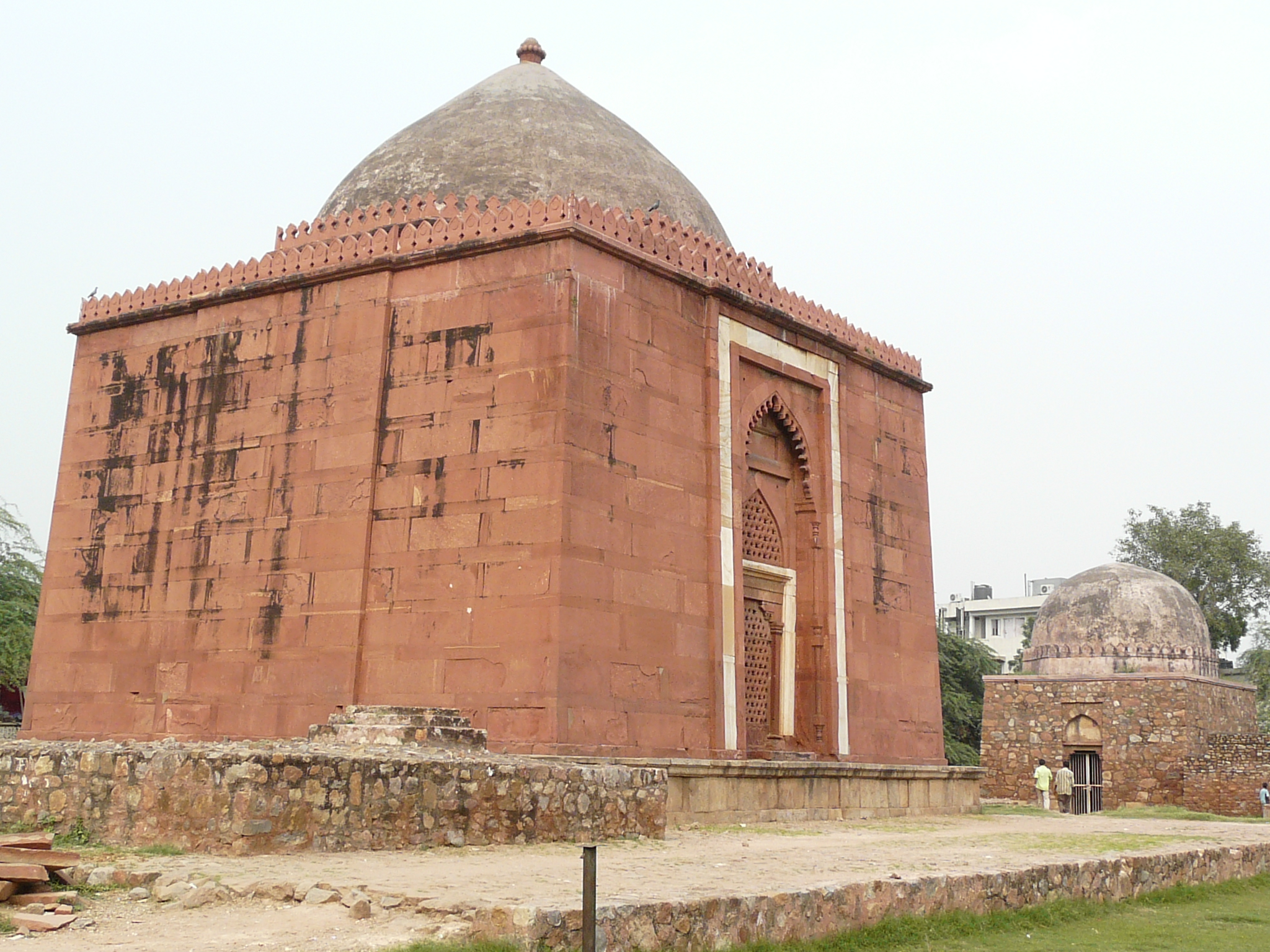 Lal Gumbad, Jahanpanah, Delhi